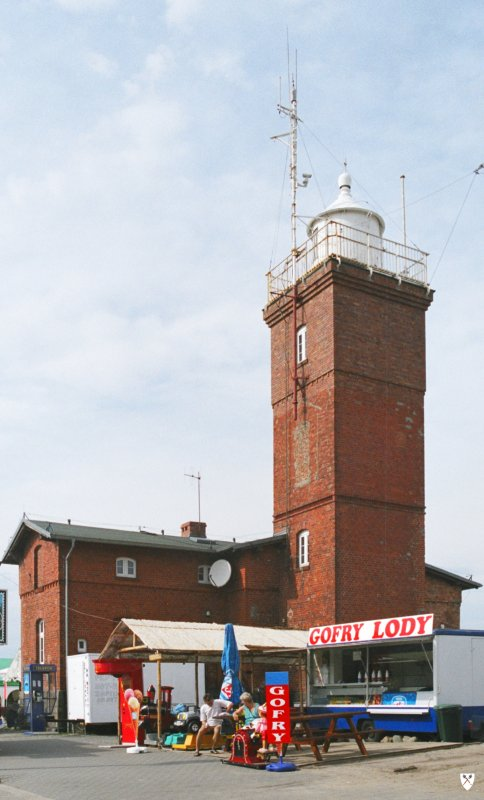 Latarnia morska w Darłowie